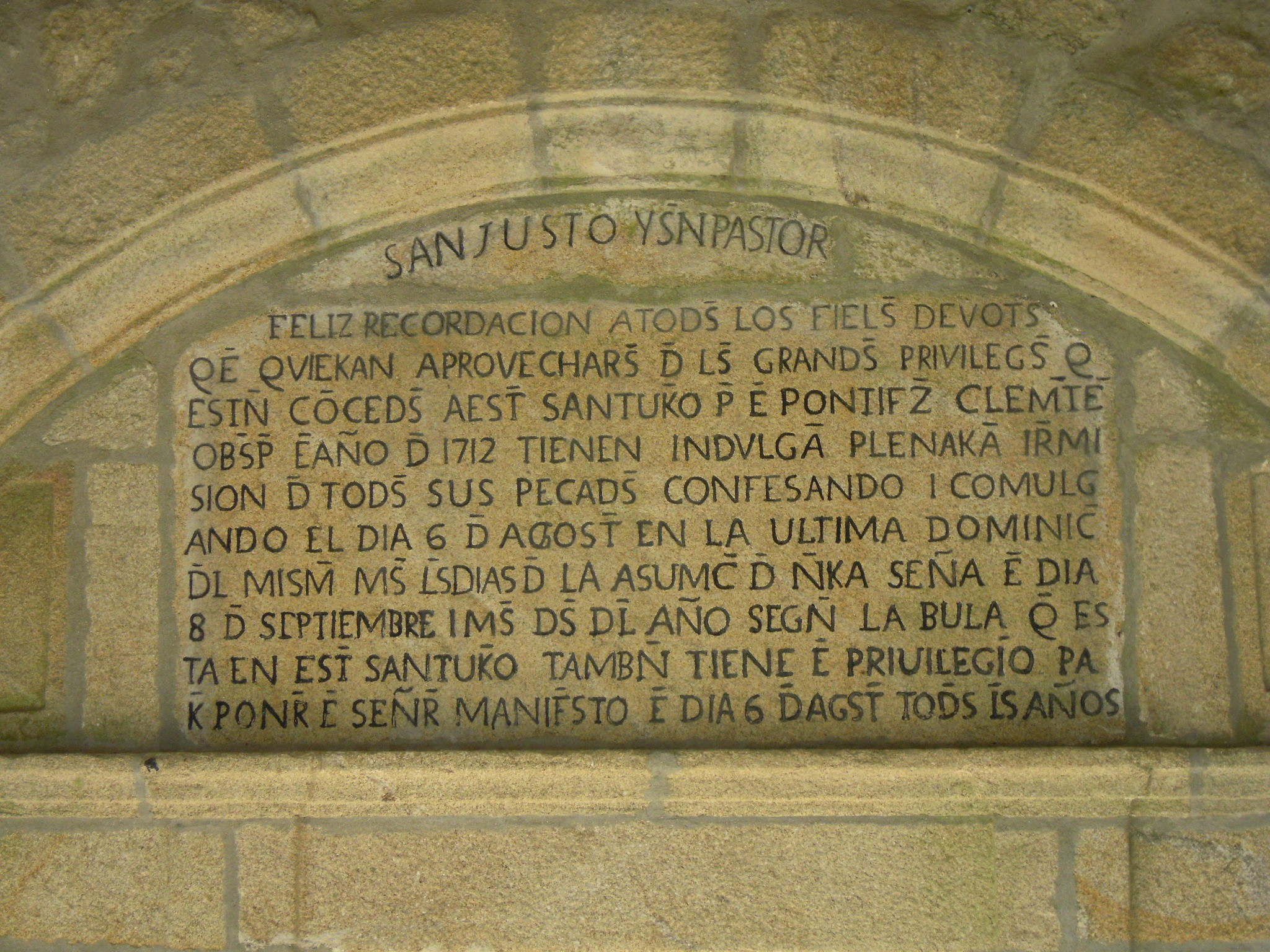 Inscrición sobre a porta principal da capela dos Santos Xusto e Pastor, na carballeira de San Xusto, en San Xurxo de Sacos (Cerdedo-Cotobade). O texto, en castelán, é o seguinte: San Justo y San Pastor. Feliz recordación a todos los fieles devotos que quieran aprovecharse de los grandes privilegios que están concedidos a este santuario por el pontífice Clemente obispo el año de 1712. Tienen indulgencia plenaria i remisión de todos sus pecados confesando i comulgando el día 6 de agosto en la última dominic del mismo más los días de la Asunción de Nuestra Señora el día 8 de septiembre más dos del año según la bula que está en este santuario también tiene el privilegio para poner ester señor manifiesto el día 6 de agosto todos los años.